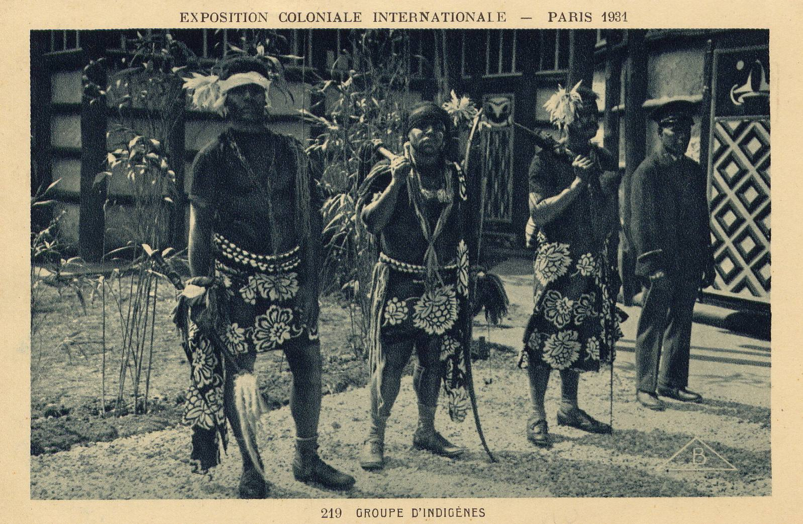 Les guerriers à l'Exposition Coloniale de Paris en 1931